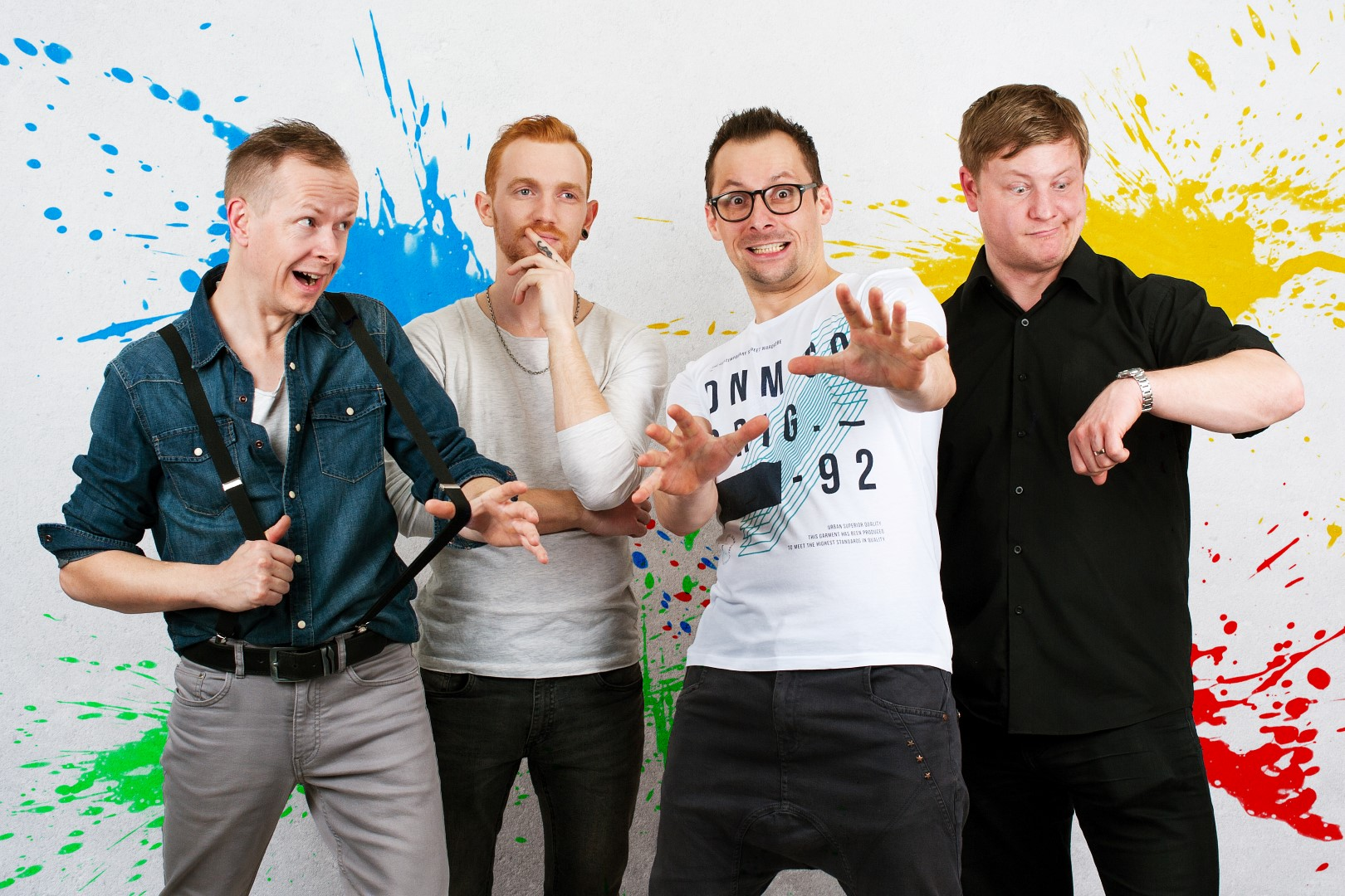 koneckonců